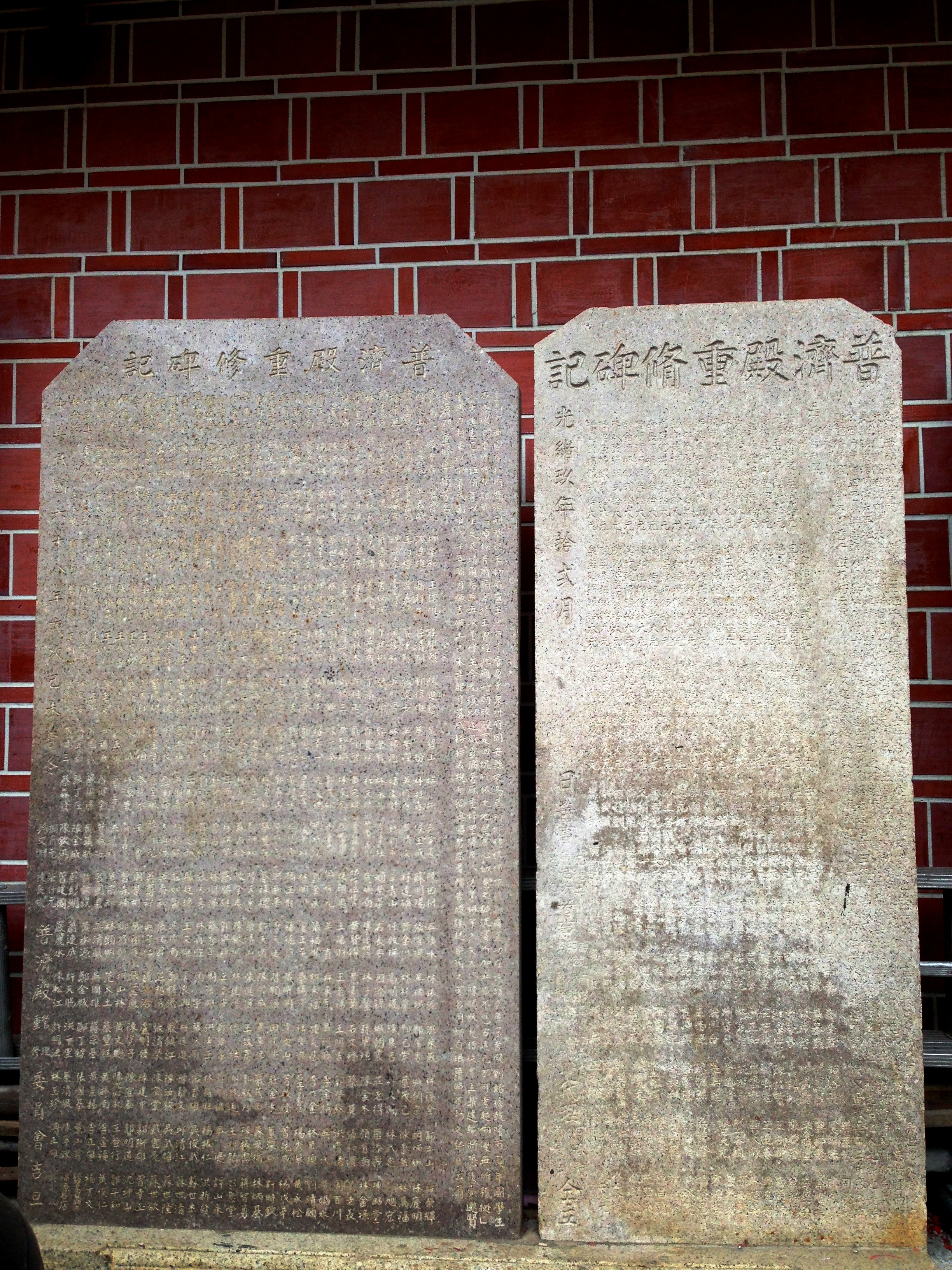 中文（台灣）: 普濟殿的石碑